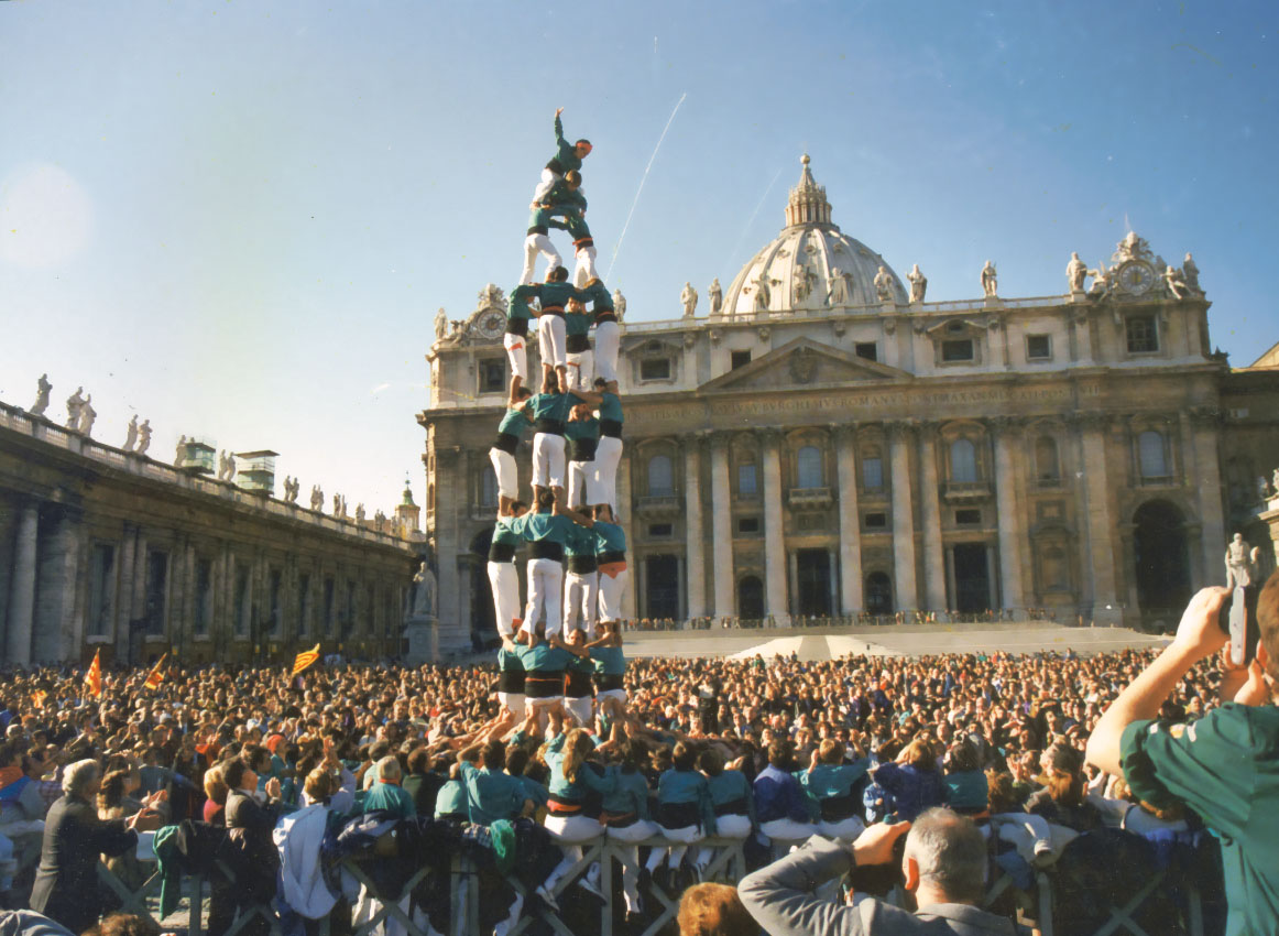 Actuació dels Castellers de Vilafranca a la Ciutat del Vaticà (1988). Quatre de vuit.